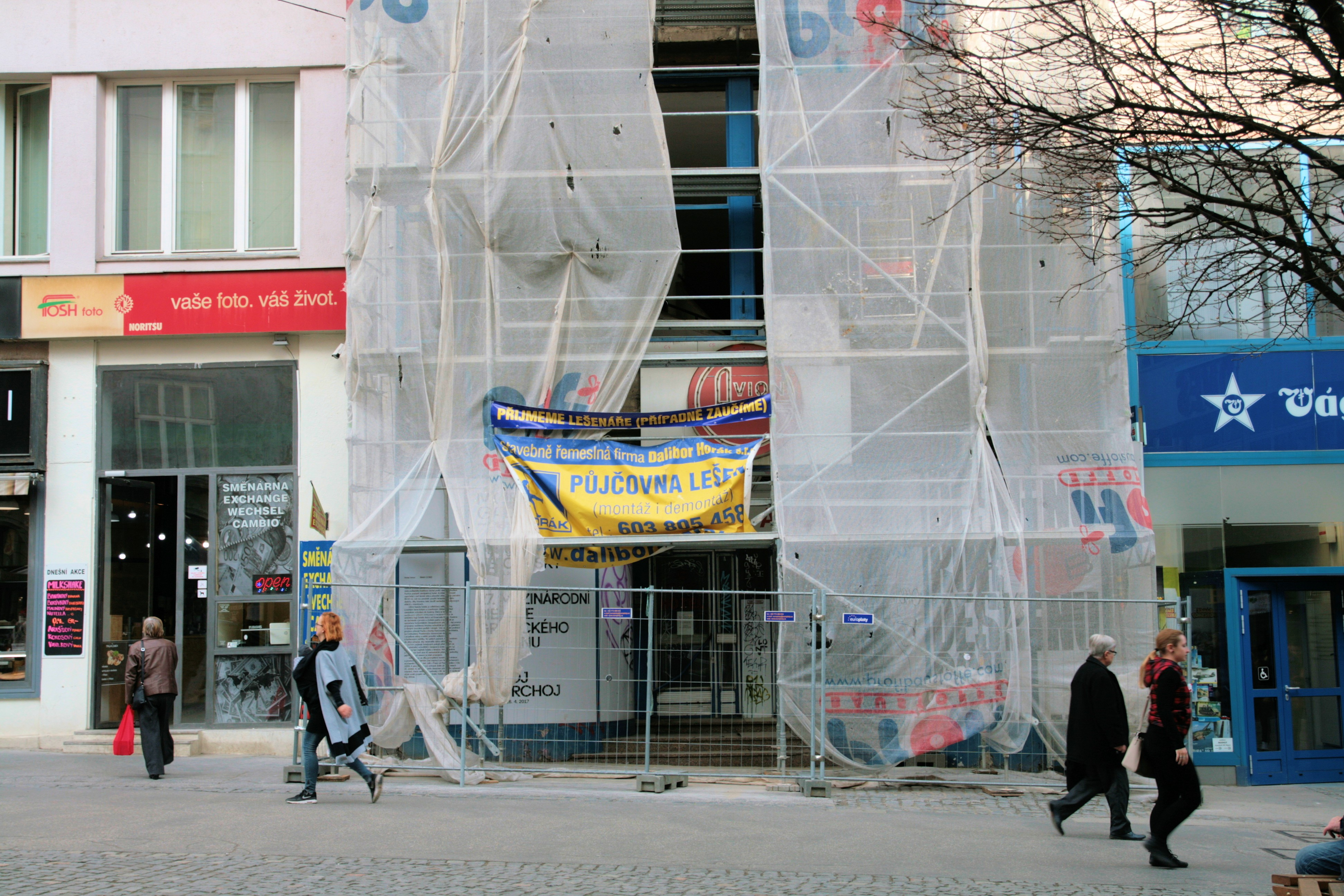 Hotel Avion v České ulici č. 150/20, Brno. Celková rekonstrukce probíhající přes zimu 2016-2017.